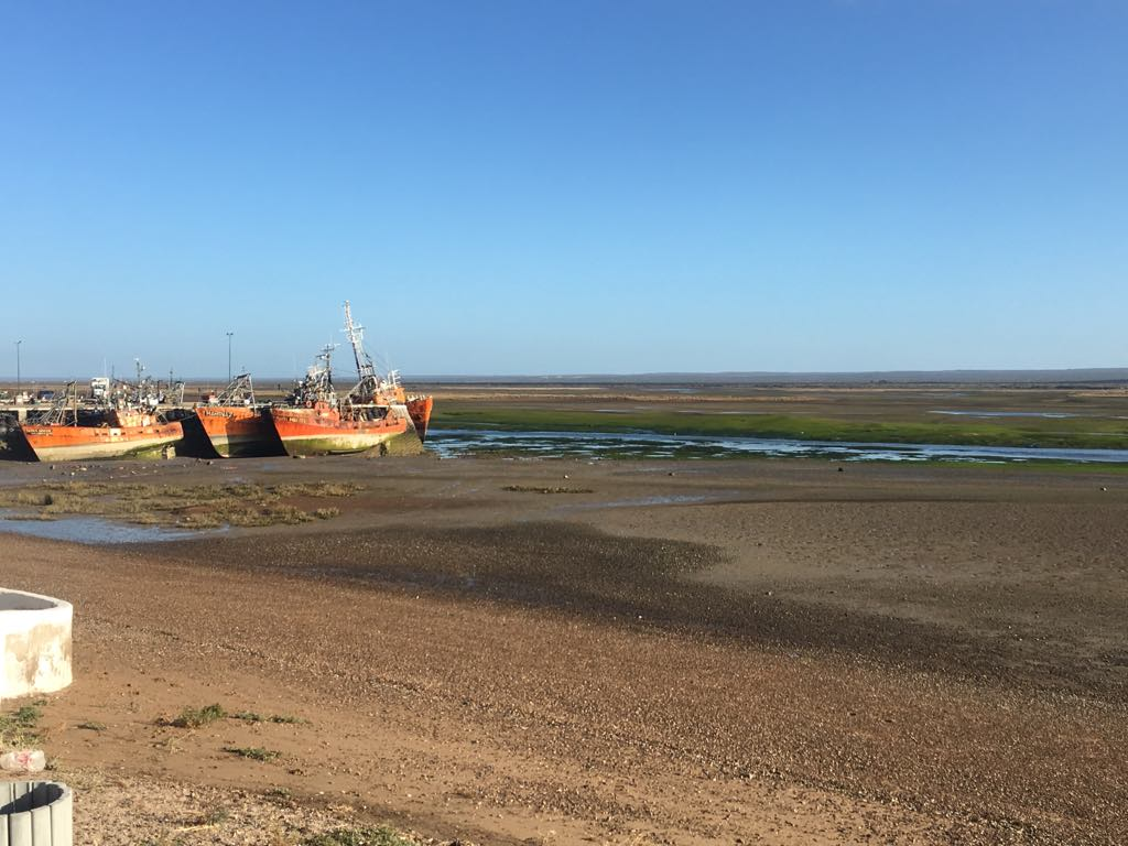 Al bajar "la marea" quedan al descubierto por completo los barcos pesqueros locales, que esperan el ascenso del mar para salir nuevamente a navegar.